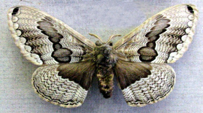 Брамея Христофа (лат. Brahmaea christophi)